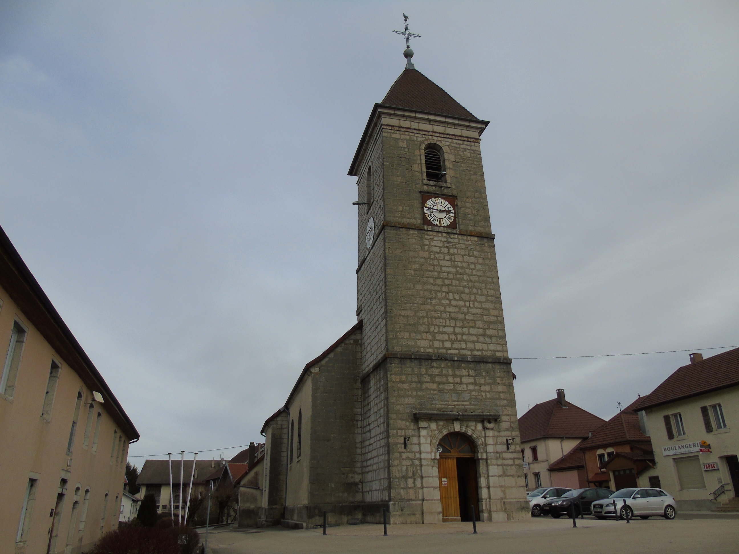 Eglise de Trévillers, Doubs, France